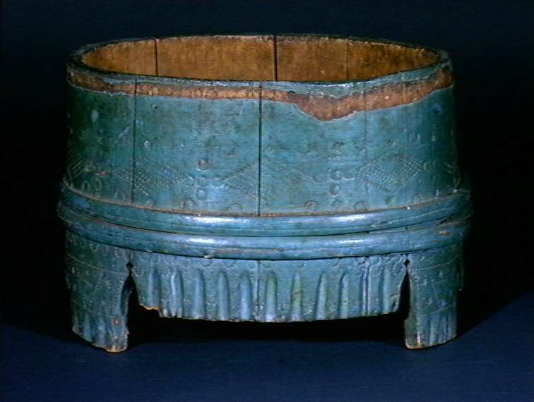 Lagget ostestaup eller ostekolle av gran, datert 1740 fra Flesberg i Buskerud. Ostestaupet har svidekor som senere er overmalt og innskriften: ANNO:17:40: AKS: Høyde 20,5 cm. Foto Anne Lise Reinsfelt / Norsk Folkemuseum, NF. 1921-1626.